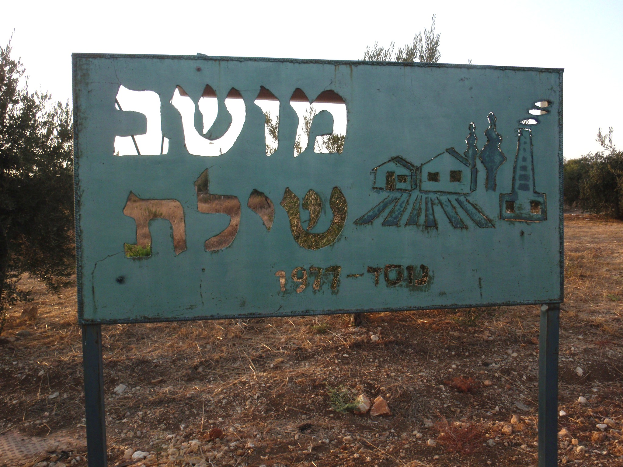 שילת שלט הכניסה למושב